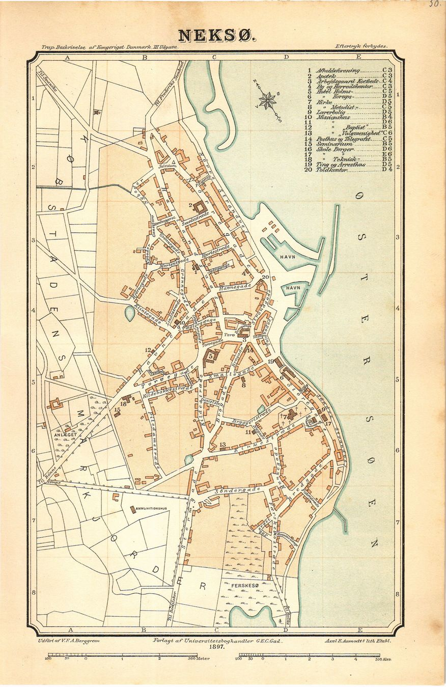 Kort over købstaden Nexø 1898